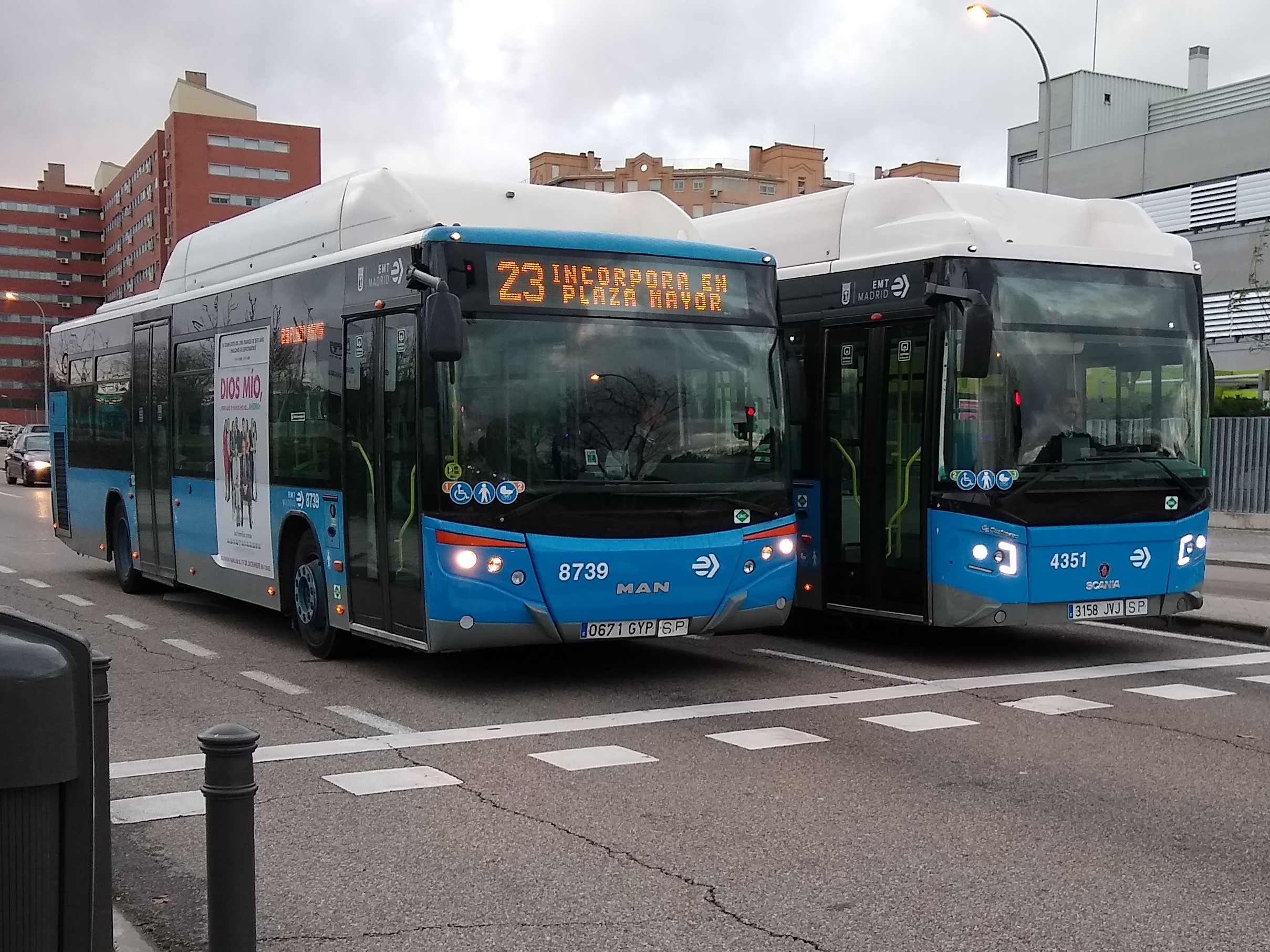 Autobús de la línea 23 de la EMT Madrid saliendo del depósito de Carabanchel; junto a otro autobús con el indicador apagado